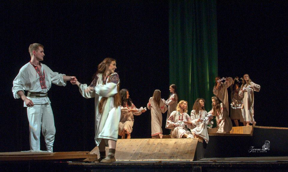 Івана Купала